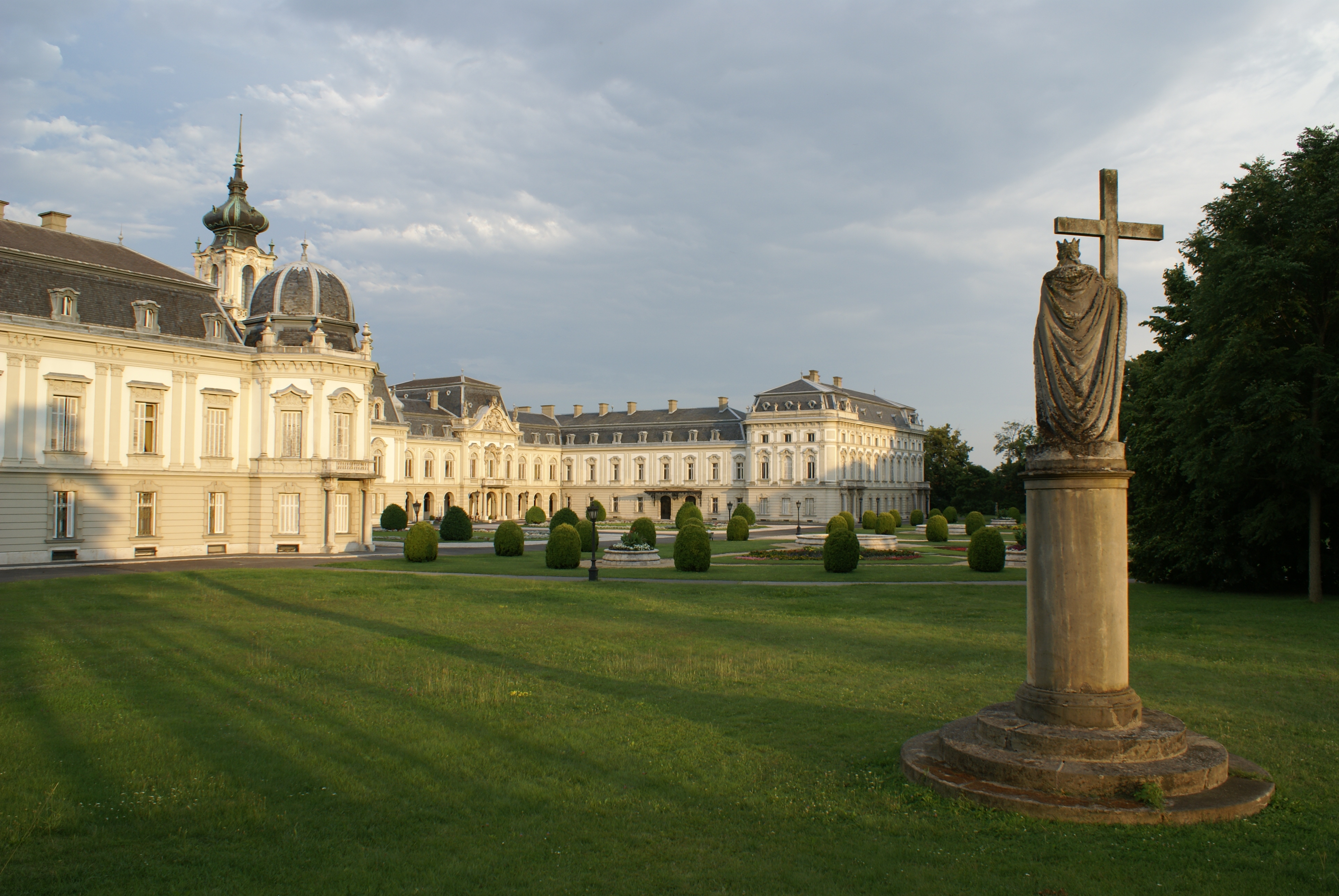 Szent Ilona-szobor (Keszthely, Kastély u. 1.) This is a photo of a monument in Hungary. Identifier: 10875